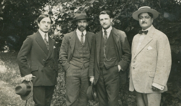 Da sinistra, Emilio Oreste Brunati, Enea Tallone, Mario Fontana e il professor Gobbi.